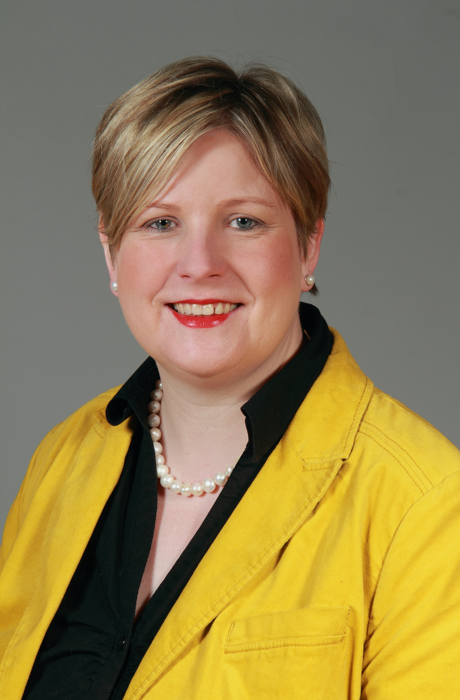 LandtagsabgeordneteR NRW